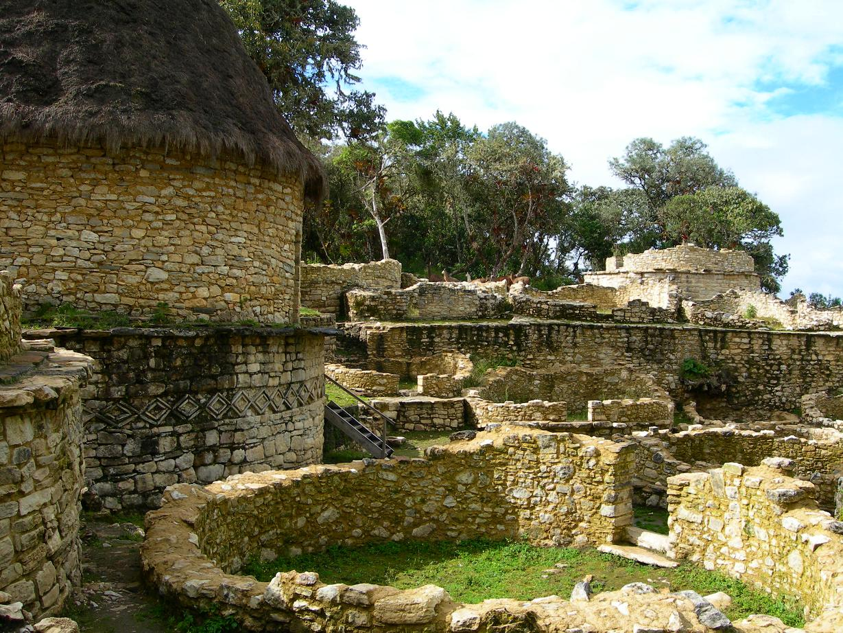 Imagen de la fortaleza de Kuelap (Perú)